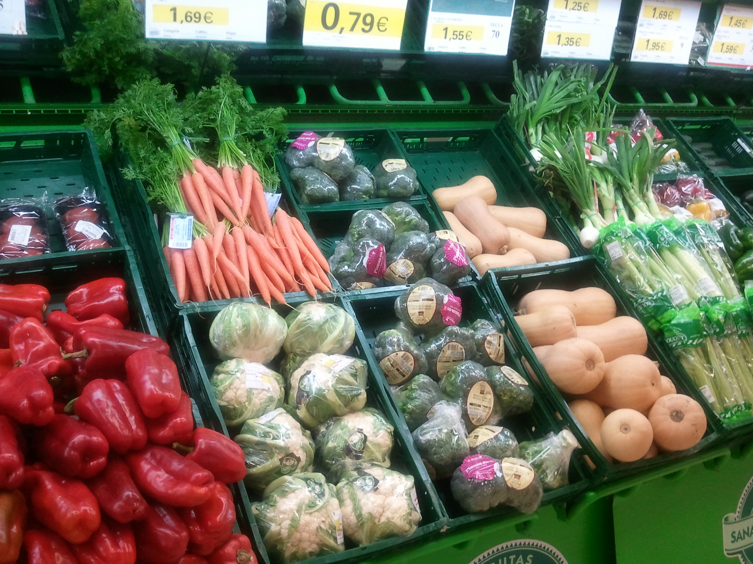 Expositor de verduras, Eroski, Chiclana de la Frontera, Cádiz, España.